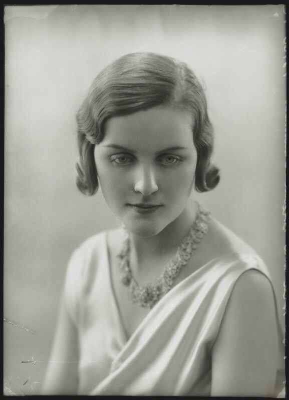 Diana Mitford, 27 janvier 1932